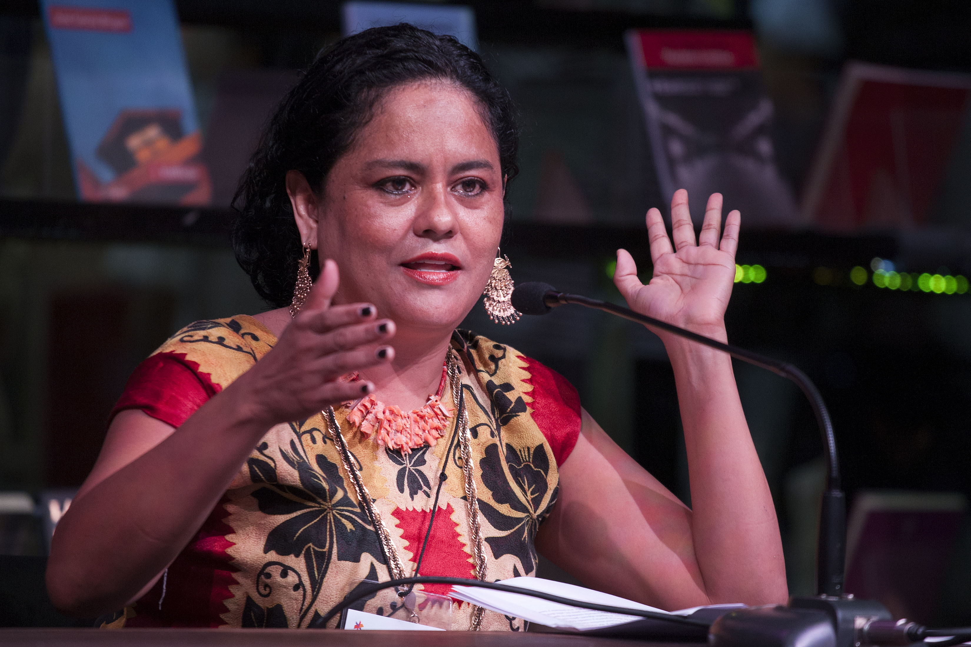 Sábado, 9 de Mayo 2015. En el marco de la 41a Feria Internacional del Libro de Buenos Aires se realizó la charla Mapa Gastronómico de una Ciudad. La comida Mexicana, Patrimonio Cultural con los escritores Tununa Mercado, Benito Taibo y Natalia Toledo en el Stand de la Ciudad de México. Foto: Antonio Nava / Secretaria de Cultura Ciudad de México.